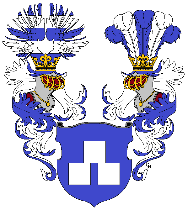 Wappen des österreichischen Juristen, Historikers und Naturforschers Ludwig Köchel (1800–1877), verliehen anlässlich seiner Erhebung in den österreichischen Ritterstand 1842. Zeichnung von Gerd Hruška ( Für weitere Informationen zu dieser Standeserhebung siehe (